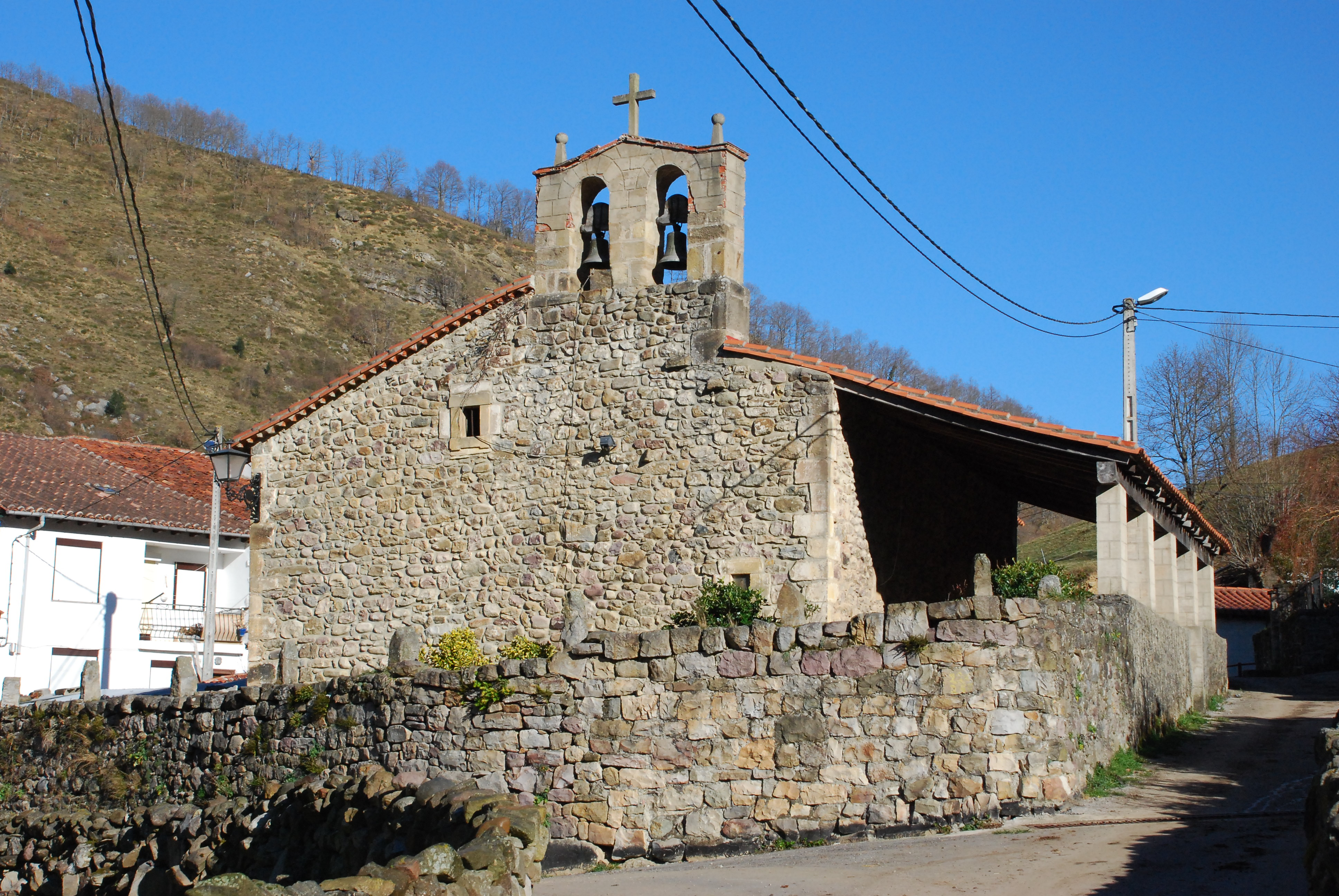 Iglesia de Santa Águeda, en el pueblo de Saja en el municipio de Los Tojos, Cantabria, España. Muy popular y rústica